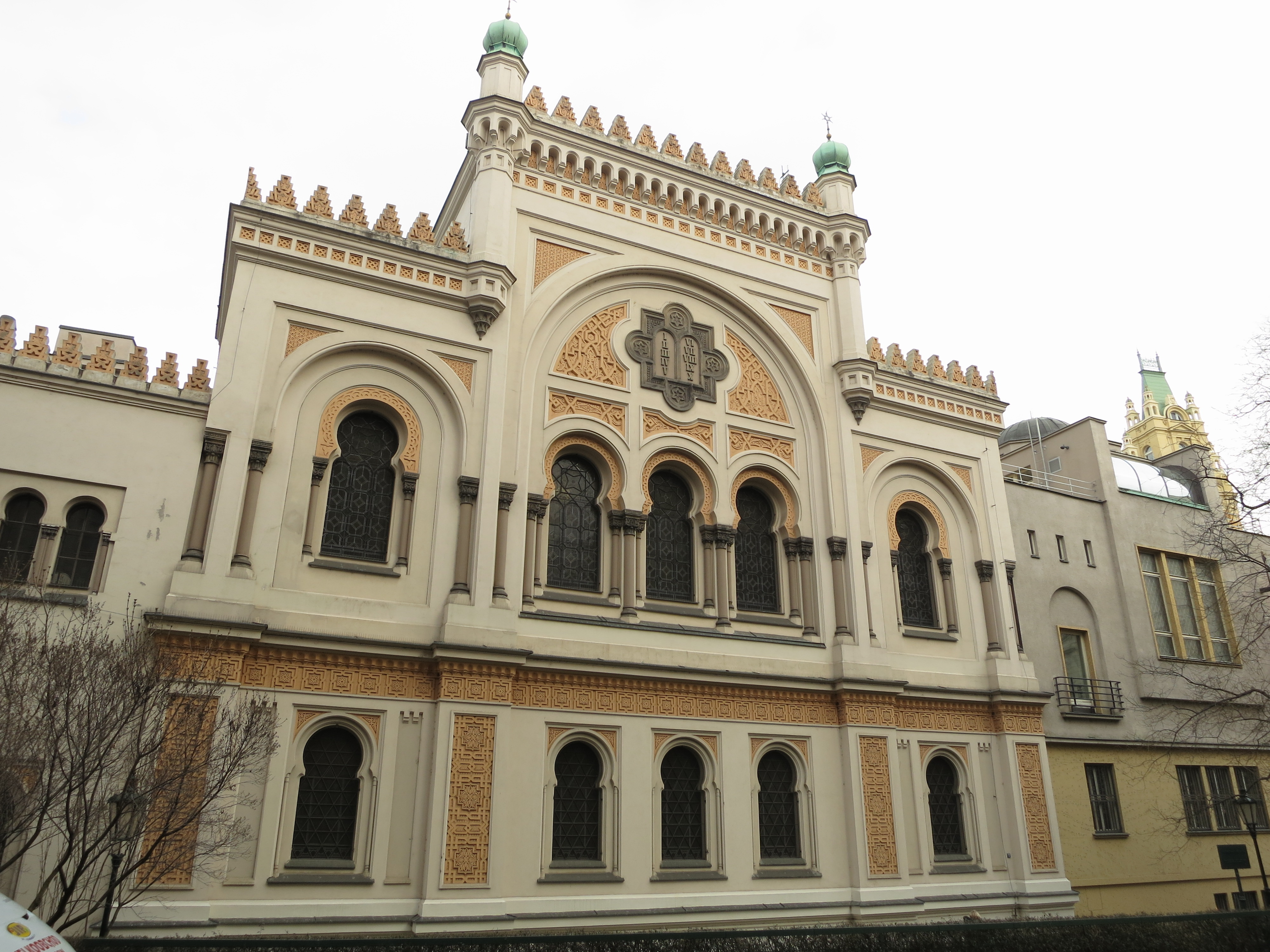 Spanische Synagoge in Prag